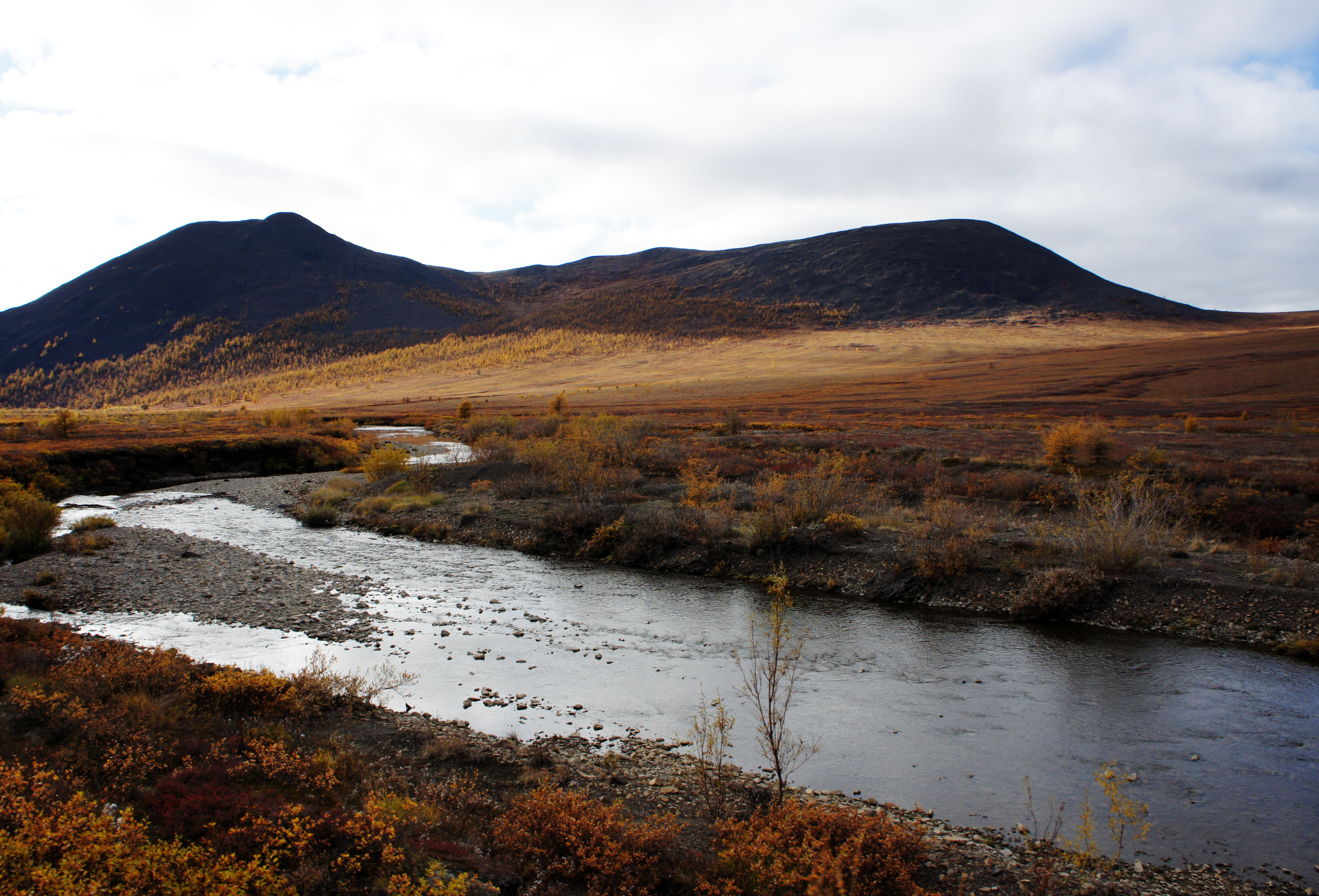 Верховья Малого Кепервеема